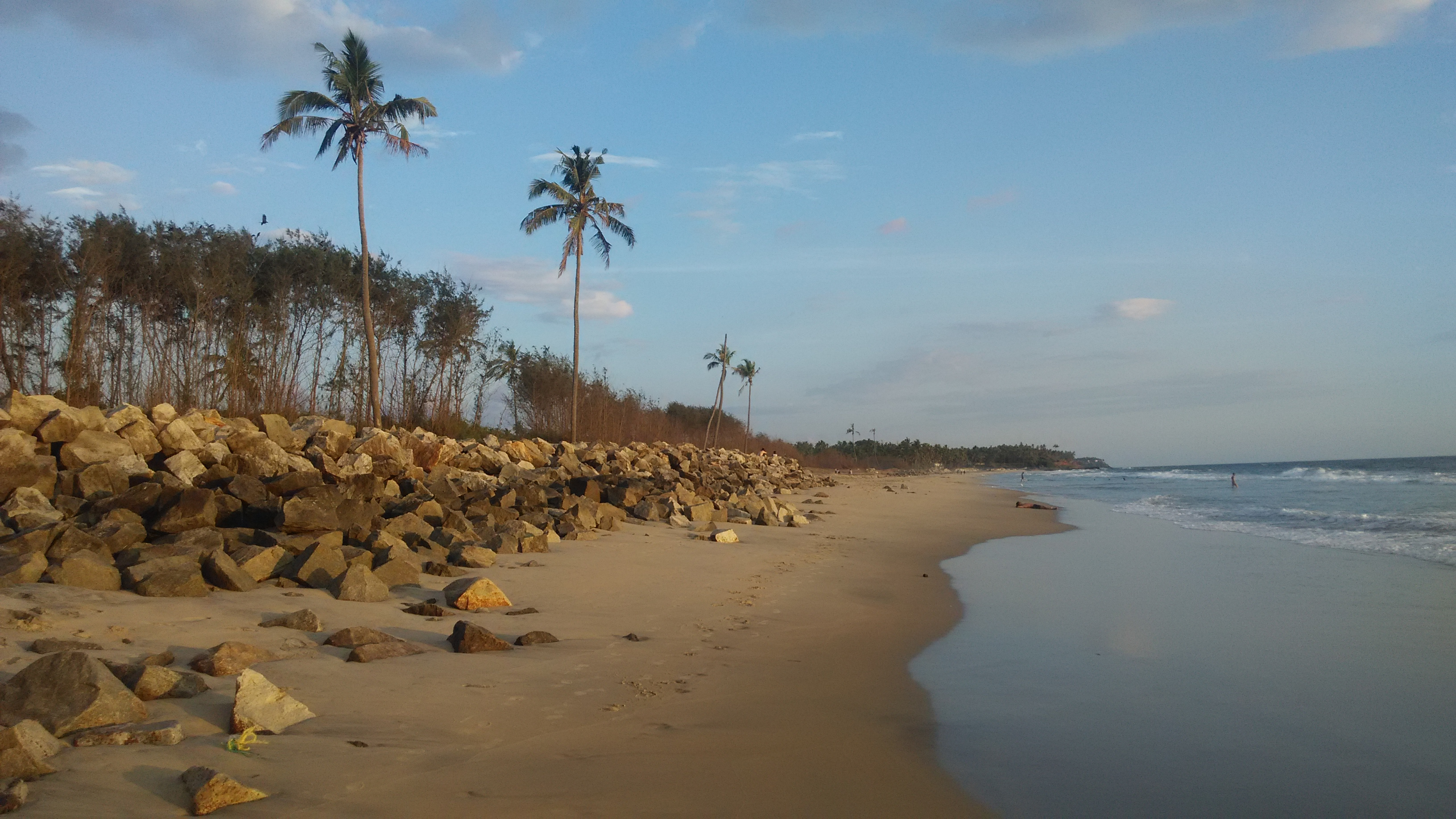 Kappil beach near Varkkala, Kollam